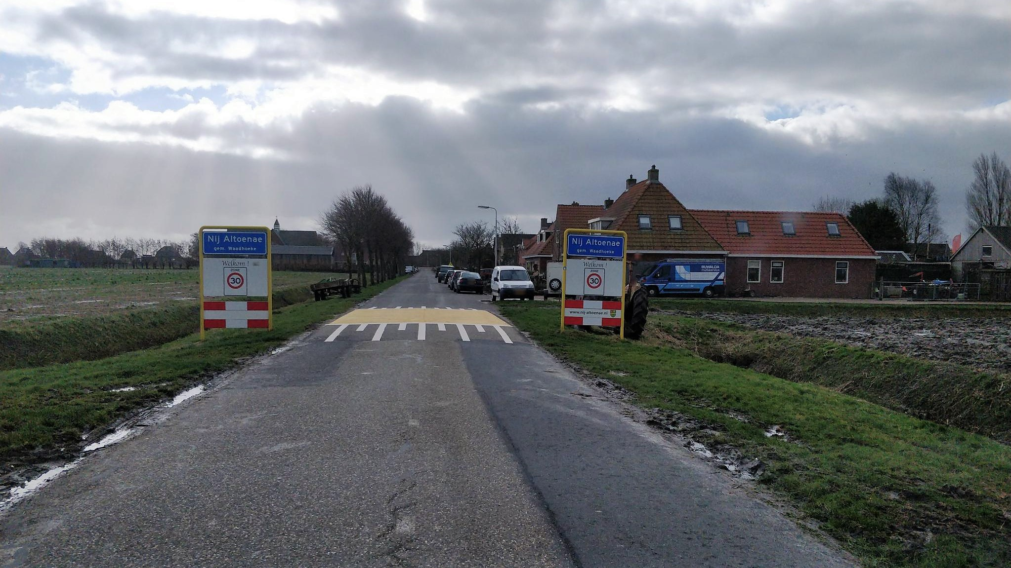 Nij Altoenae Waadhoeke